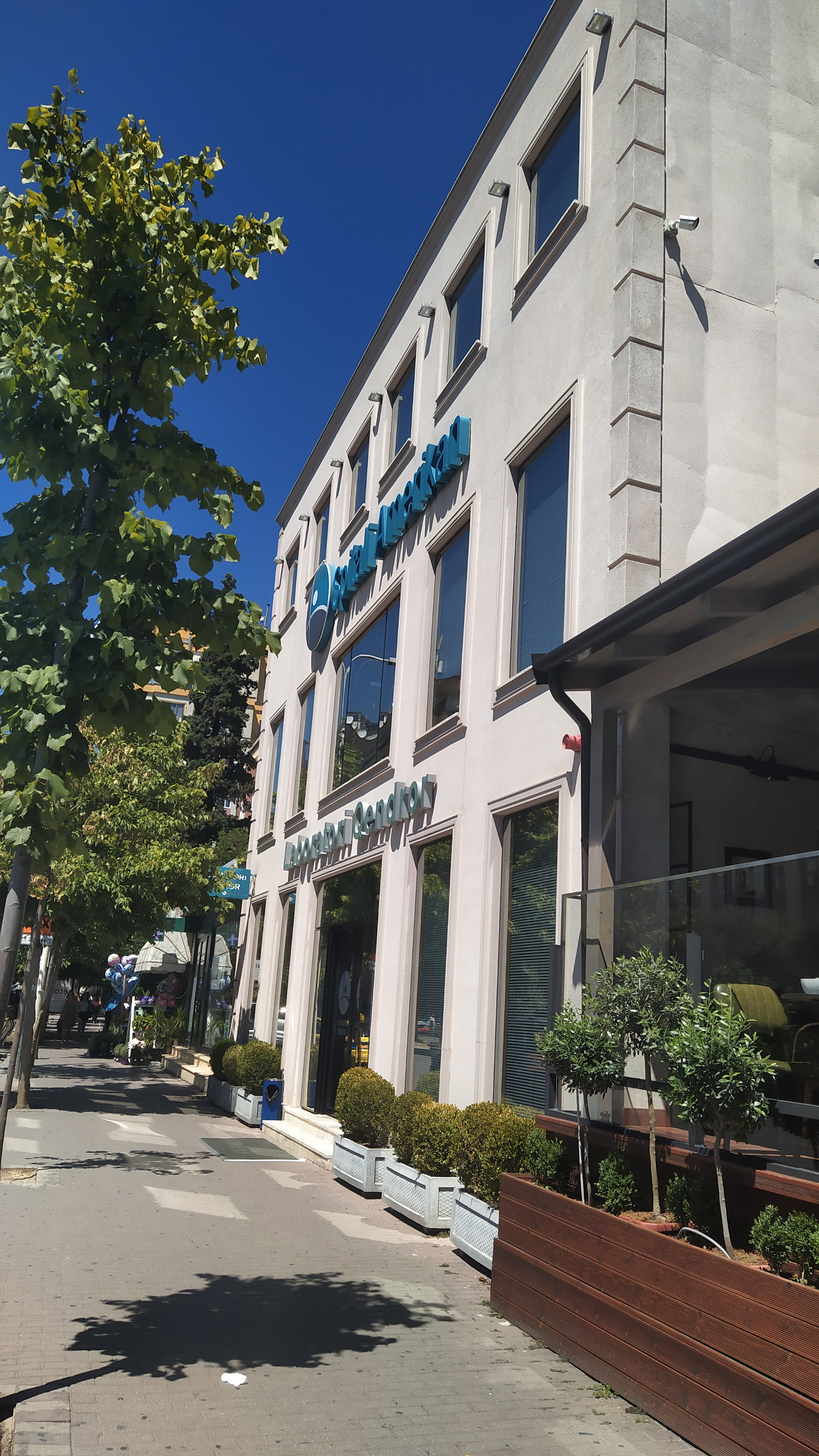 Ndërtesa e laboratorit të Spitalit Amerikan.